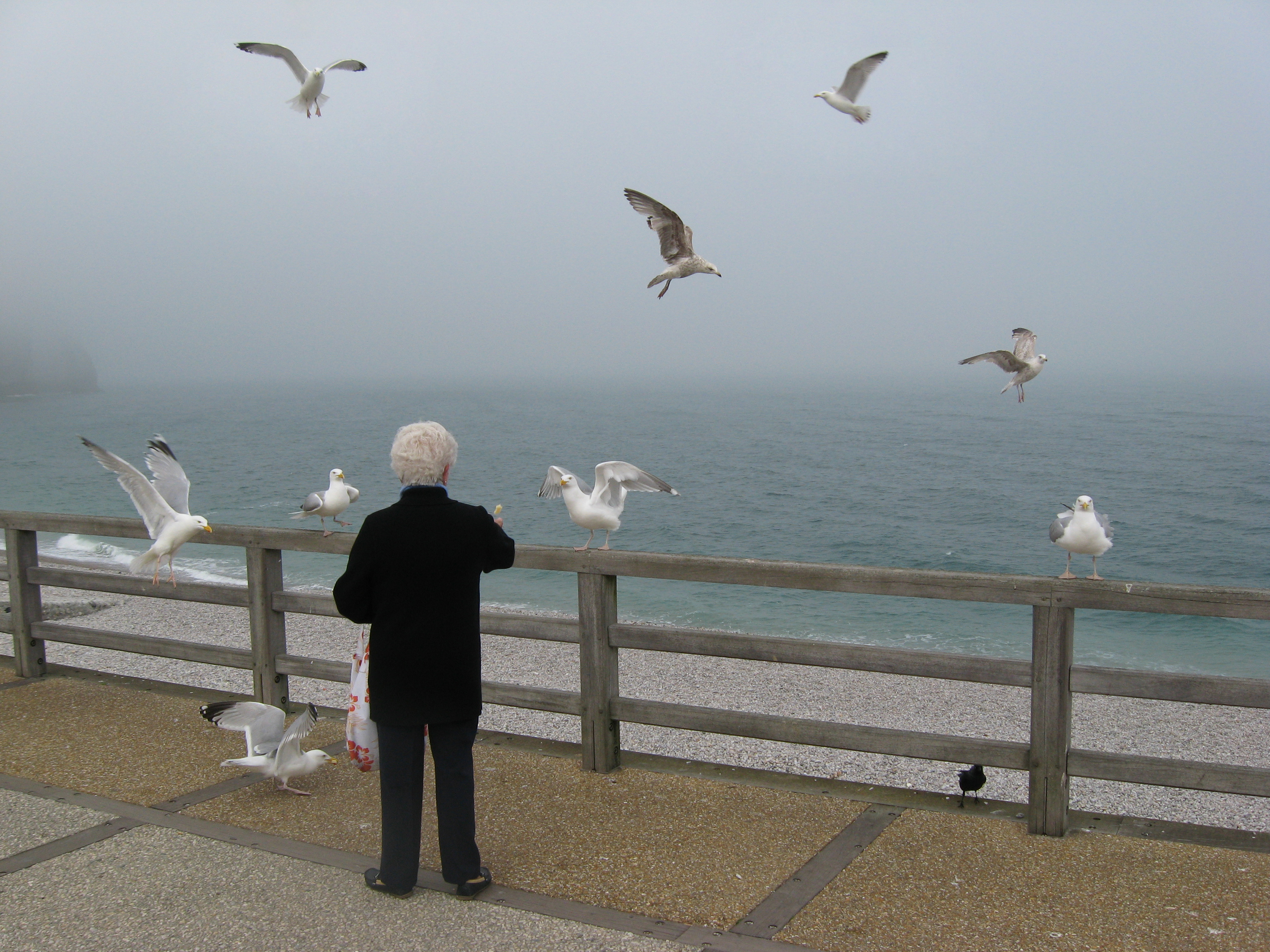 Fütterung der Möwen und Dohlen im Morgennebel von Étretat Datum: 22.05.2010 Urheber: Michael Pfeiffer alias user "Gordito1869" Quelle: privates Fotoarchiv des Urhebers